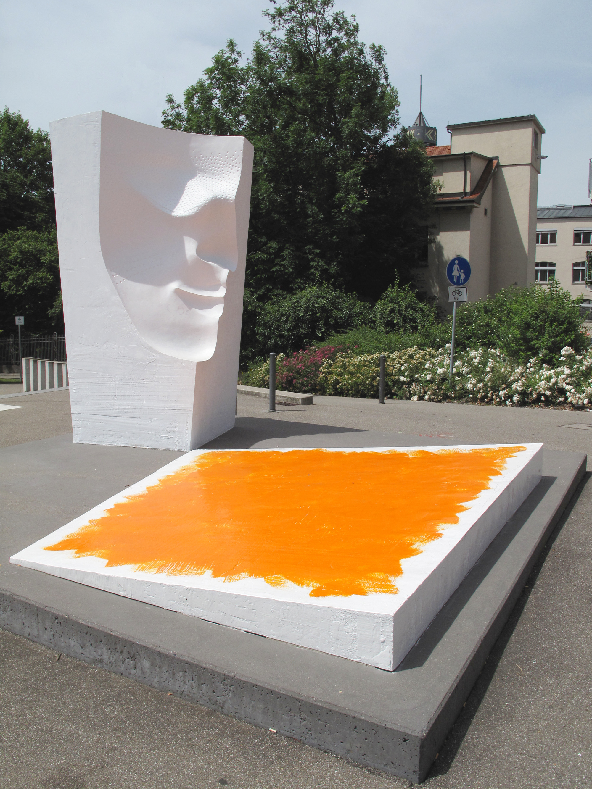 Beatrix Sassen, Licht im Kopf, 2002, - Deutschland, Baden-Württemberg, Lörrach, Skulpturenweg